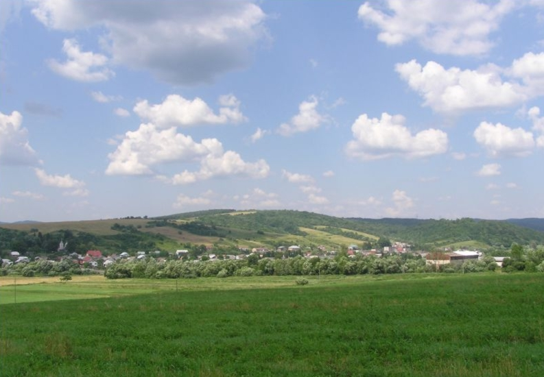 Беларуская (тарашкевіца): Від на вёску Ладамірава